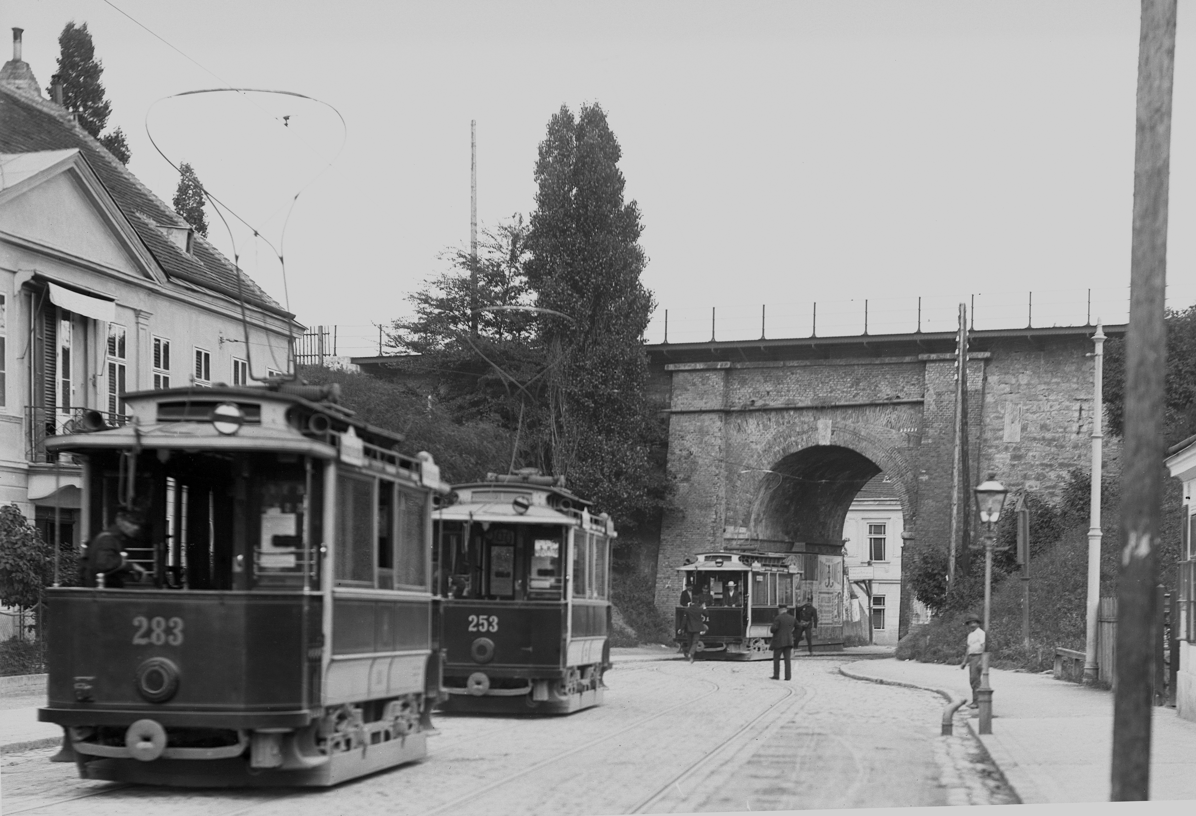 Hetzendorfer Straße, strato en Vieno